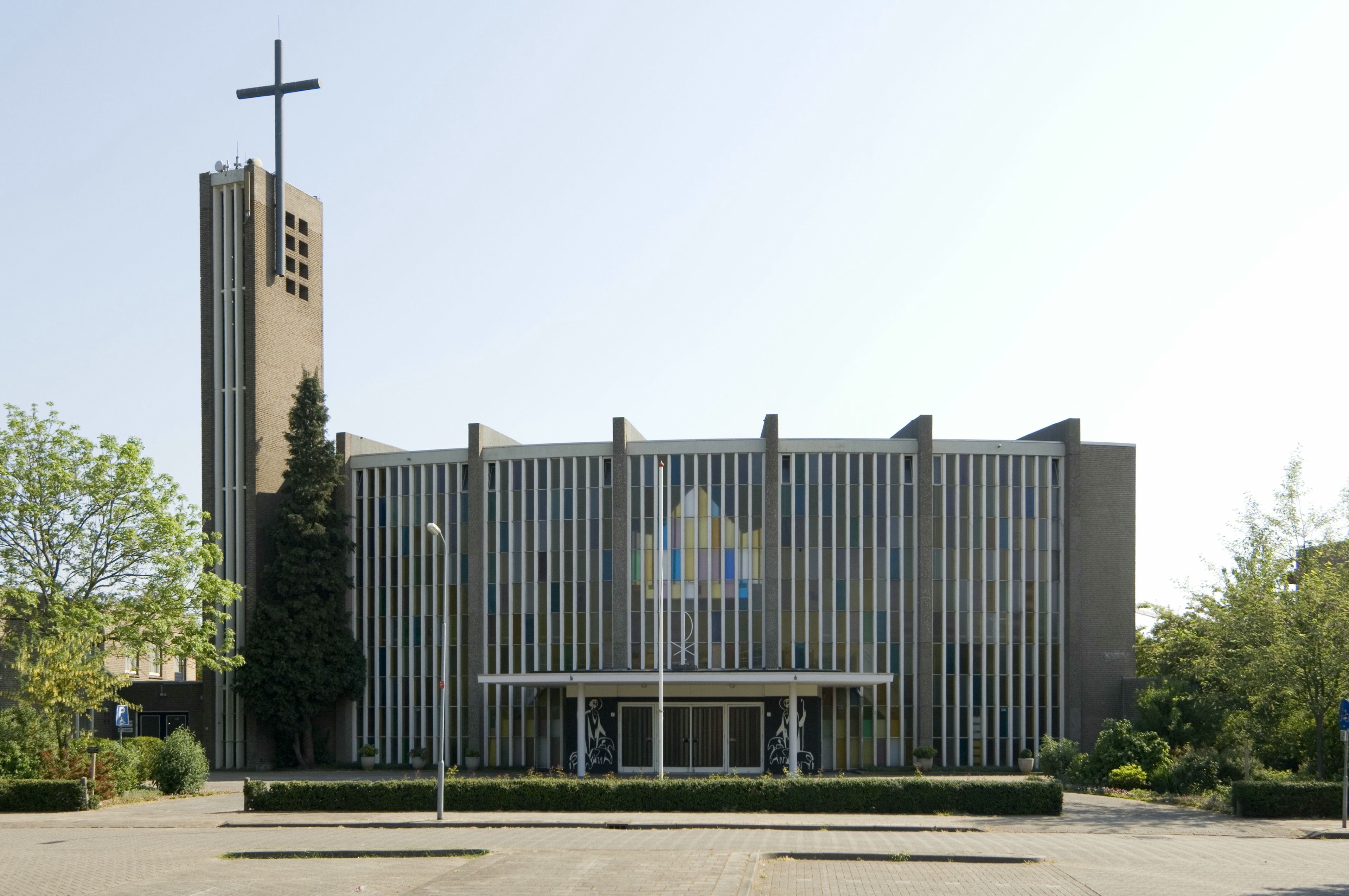 De Goede Herder: Overzicht van de westgevel